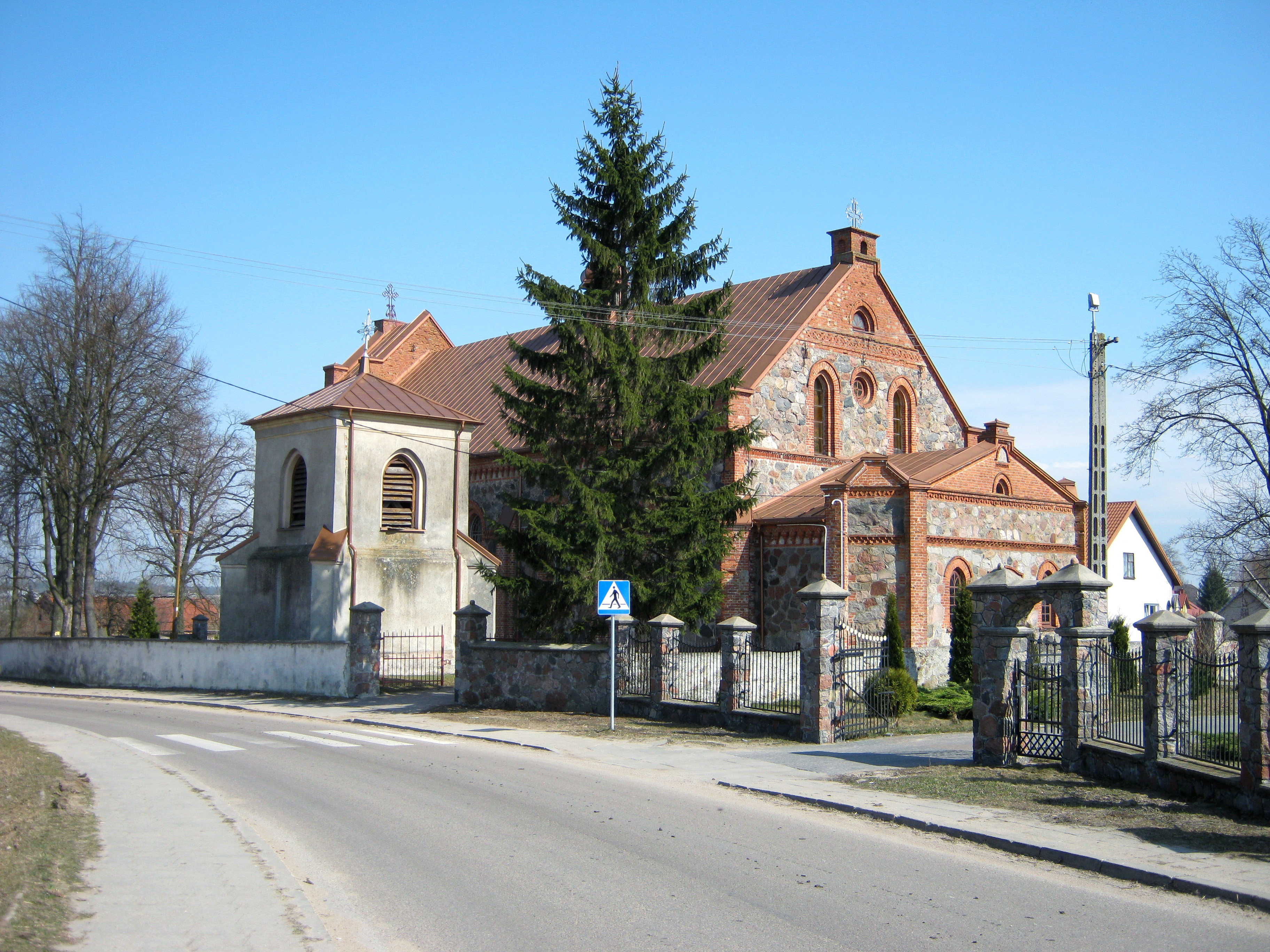 Lachowo - kościół parafialny p.w. Przemienienia Pańskiego, mur., 1874-1878